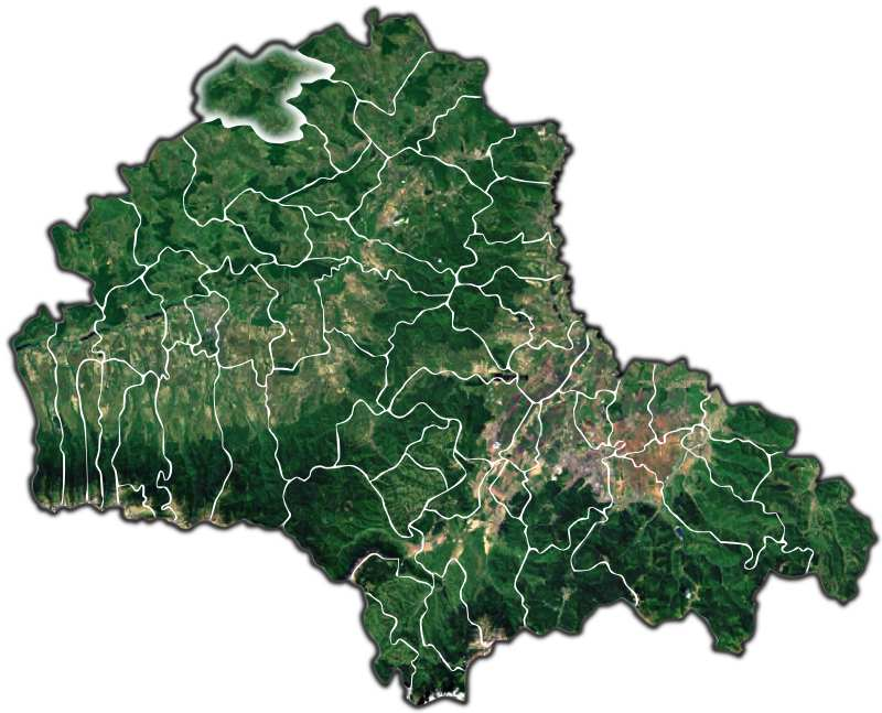 Bunesti jud Brasov